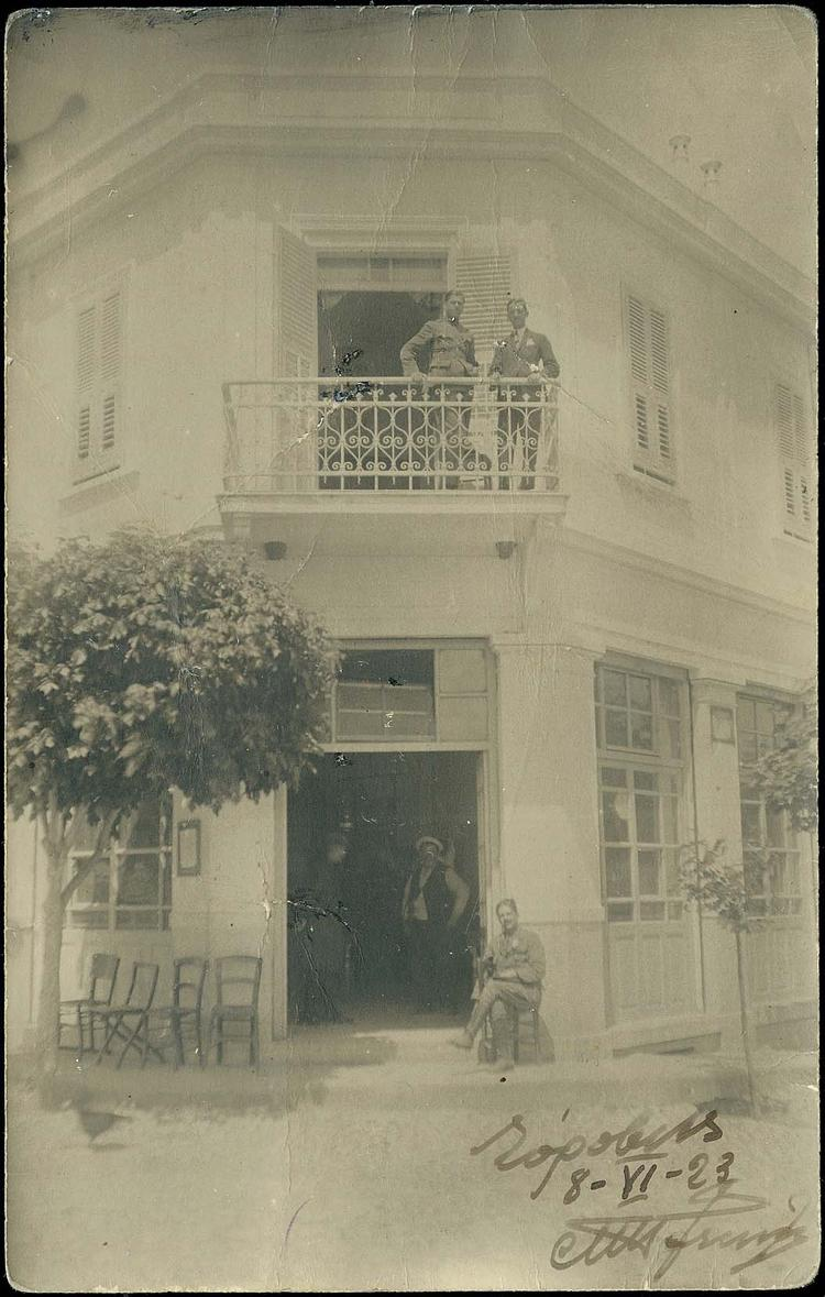 Суровичево